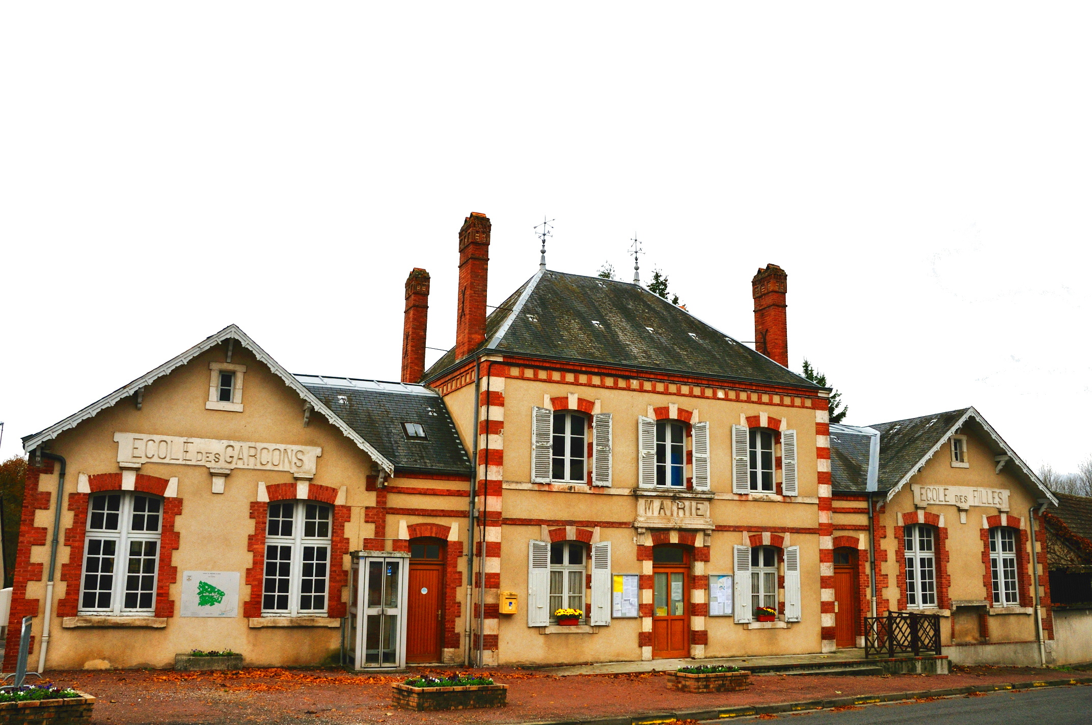 Mairie-écoles, Ménétréol-sur-Sauldre, Cher, France